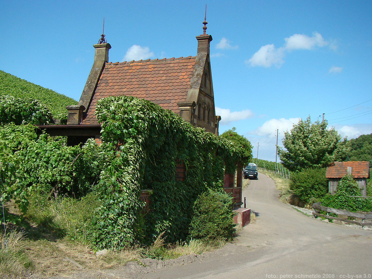 Historisches Weinberghaus am Oberen Ried am Wartberg in Heilbronn